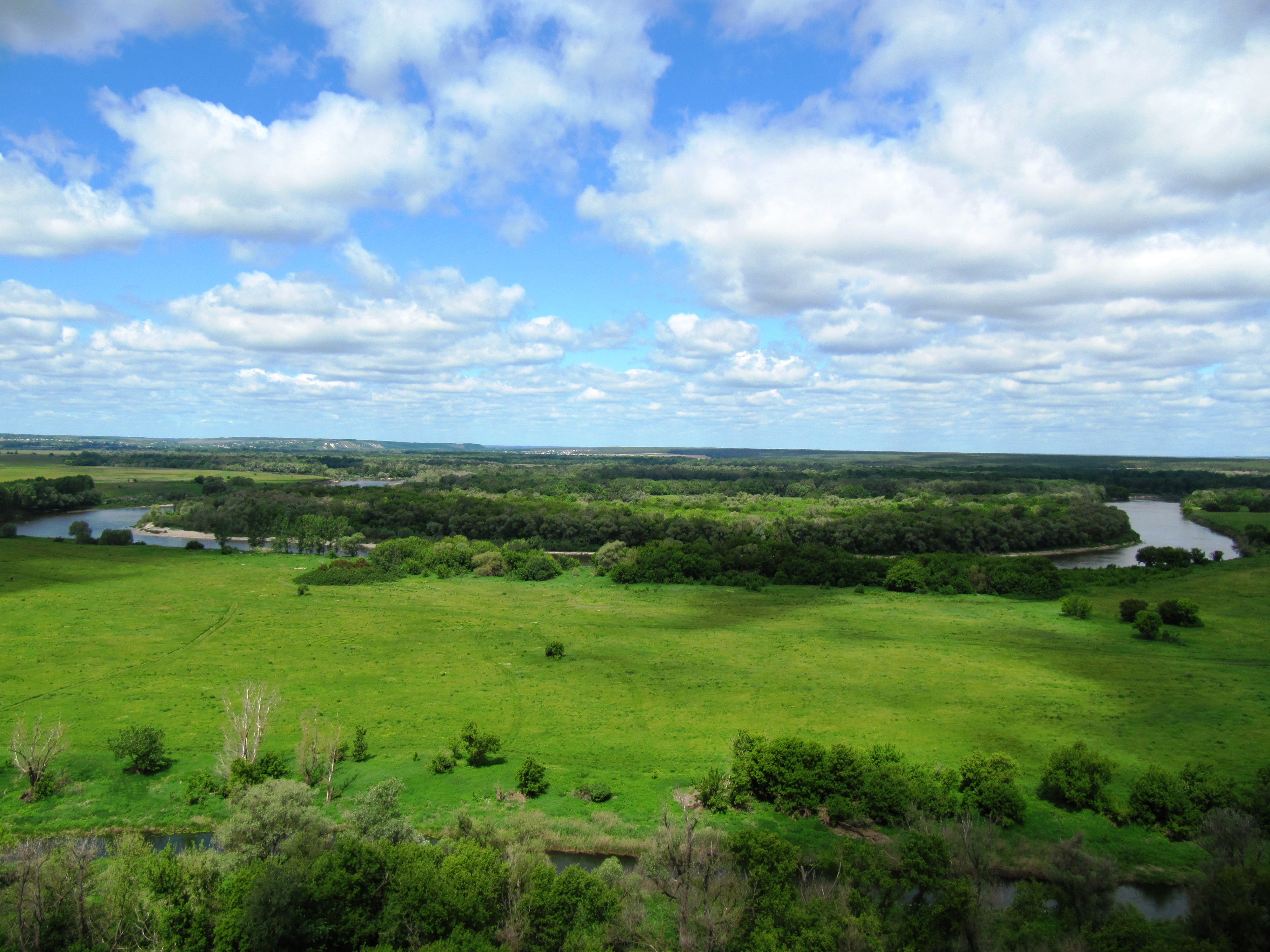 На переднем плане – река Тихая Сосна, на заднем – Дон.